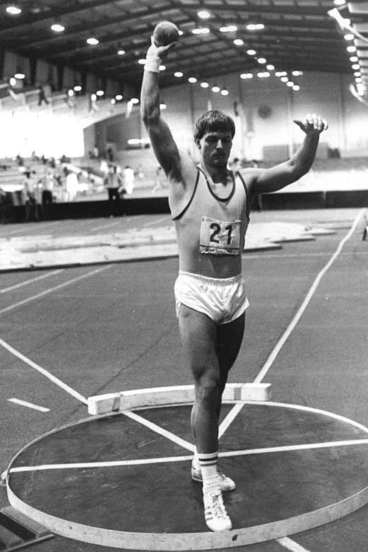 Torsten Voß ADN-ZB Weisflog 7.1.84 Bez.Cottbus: DDR-Hallenmeisterschaften Leichtathletik in Senftenberg- Torsten Voß (SC Traktor Schwerin) sicherte sich den Titel im Siebenkampf der Männer. Mit 6018 Punkten blieb er als erster DDR-Mehrkämpfer in der Halle über der 6000-Punkte-Marke und erzielte damit eine neue DDR-Hallenbestleistung.